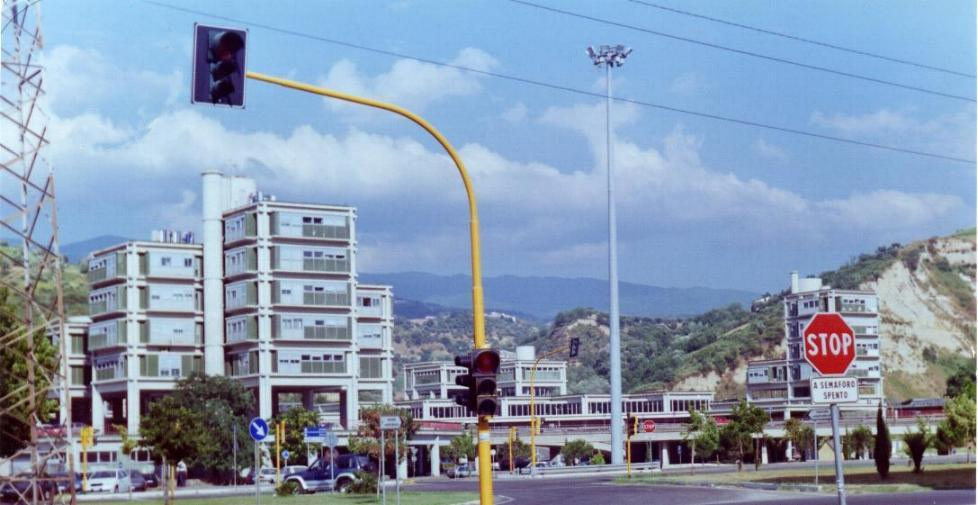 LA FACCIATA ESTERNA DELLA STAZIONE FERROVIARIA DI VAGLIO LISE A COSENZA (FERROVIE DELLO STATO)